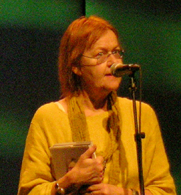 Tua Forsström.